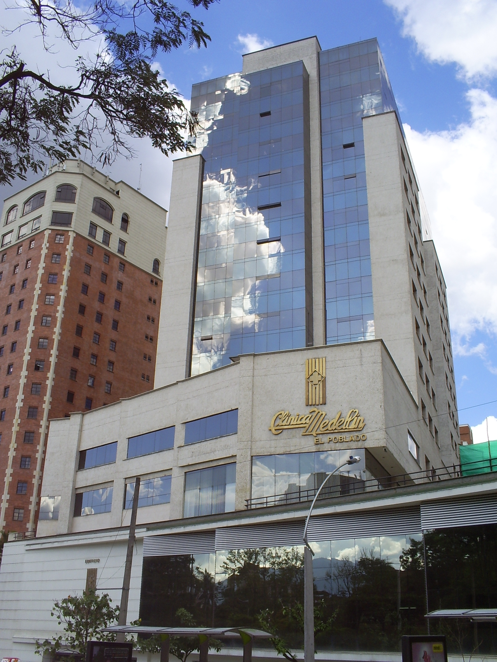 Clínica Medellín, Avenida Poblado, Medellín, Colombia